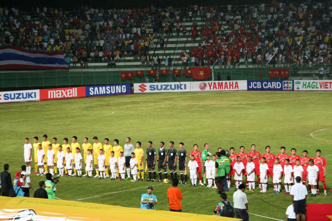 AFF Suzuki Cup 2009